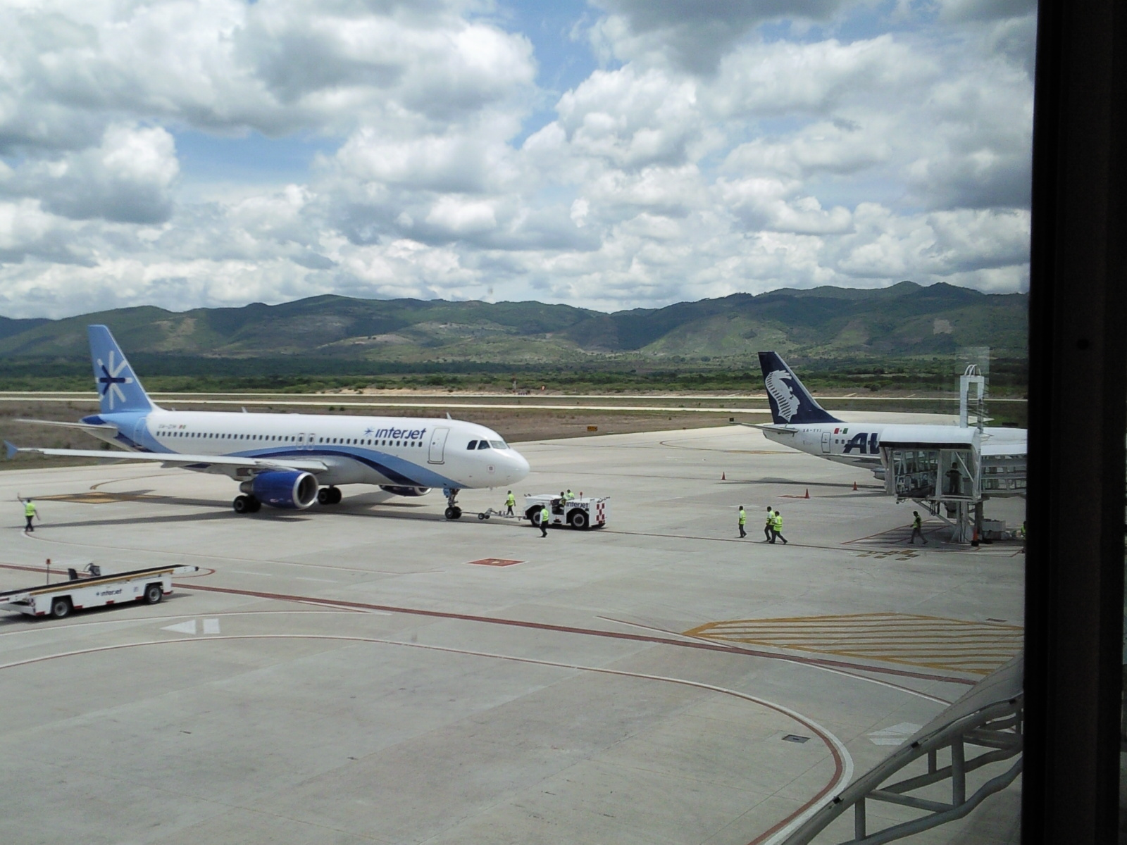 Puntos de contacto de las puertas 4 y 5, Aeropuerto Internacional Ángel Albino Corzo, Tuxtla Gutiérrez, México